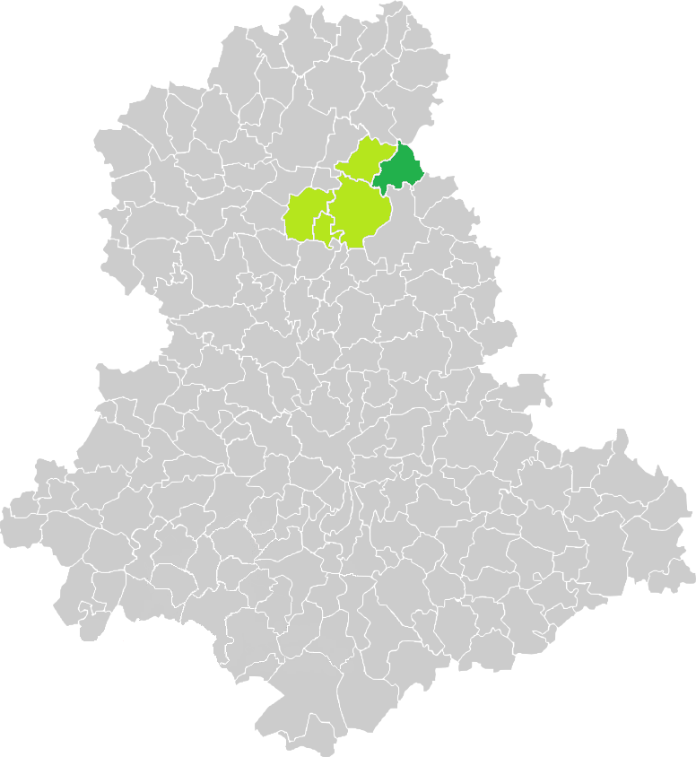 Carte de situation de la commune de Saint-Amand-Magnazeix (en vert foncé) dans le votre Canton (en vert clair) sur une carte des communes de la Haute-Vienne